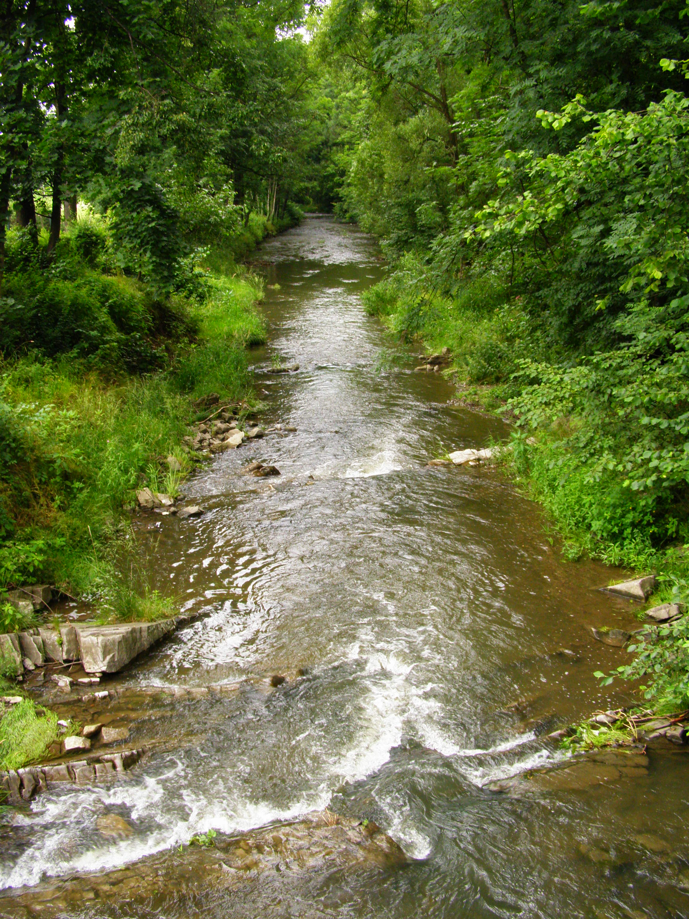 Ondřejnice protékající obcí Hukvaldy